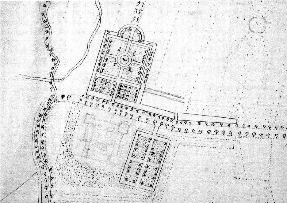 Plattegrond van de tuinen van kasteel Haeren in Voerendaal, 18e of vroege 19e eeuw. De tuinen zijn strak ingedeeld in Franse of Hollandse stijl. Het kasteel zelf is (later?) met potlood ingetekend.